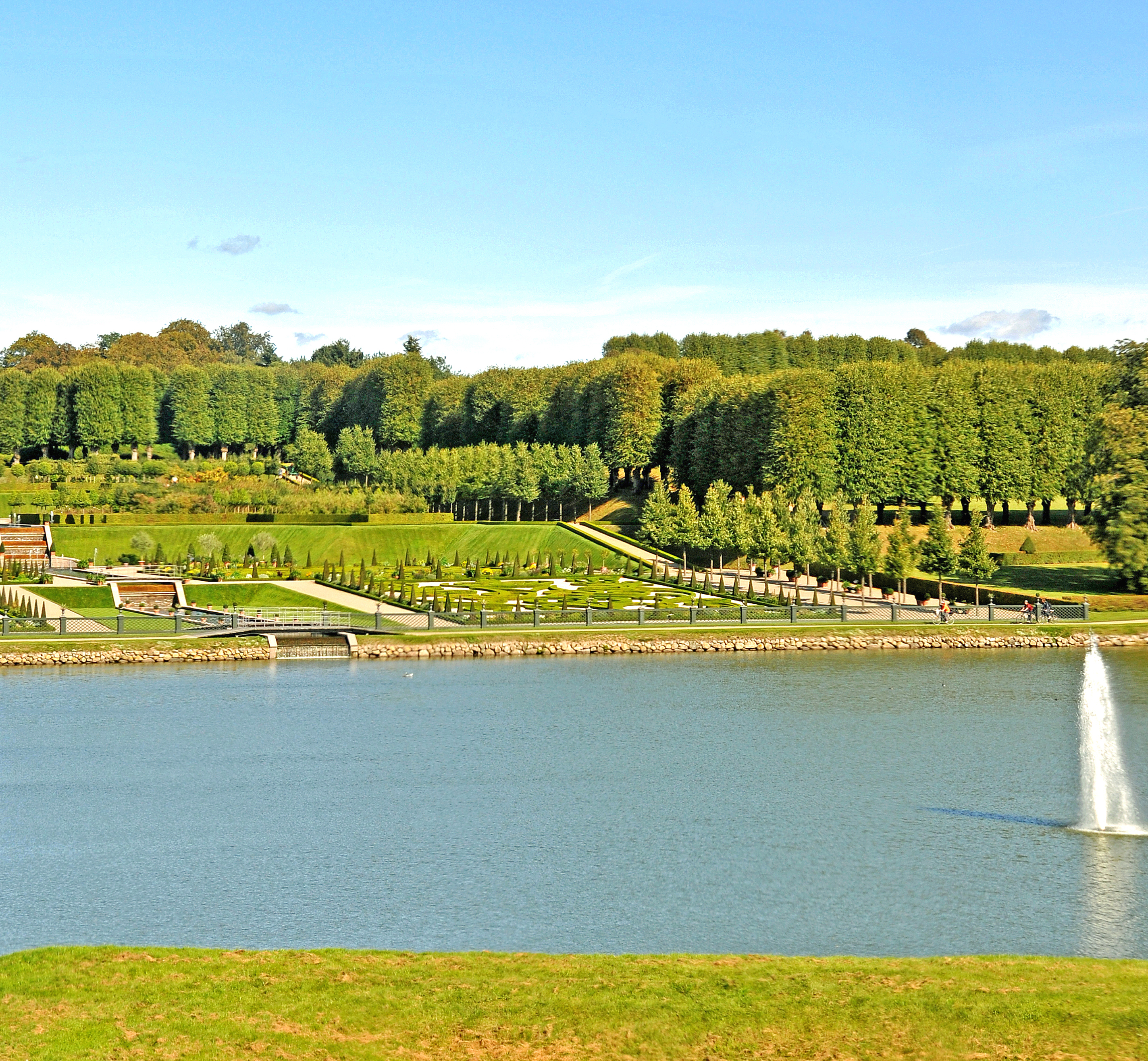 Frederiksborg Castle's park seen from the Castle in Hillerød, Denmark